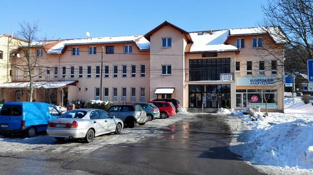 Zdravotné stredisko v Krásne nad Kysucou, vybudované v roku 1972.